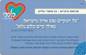 תמונה של כרטיס התורם